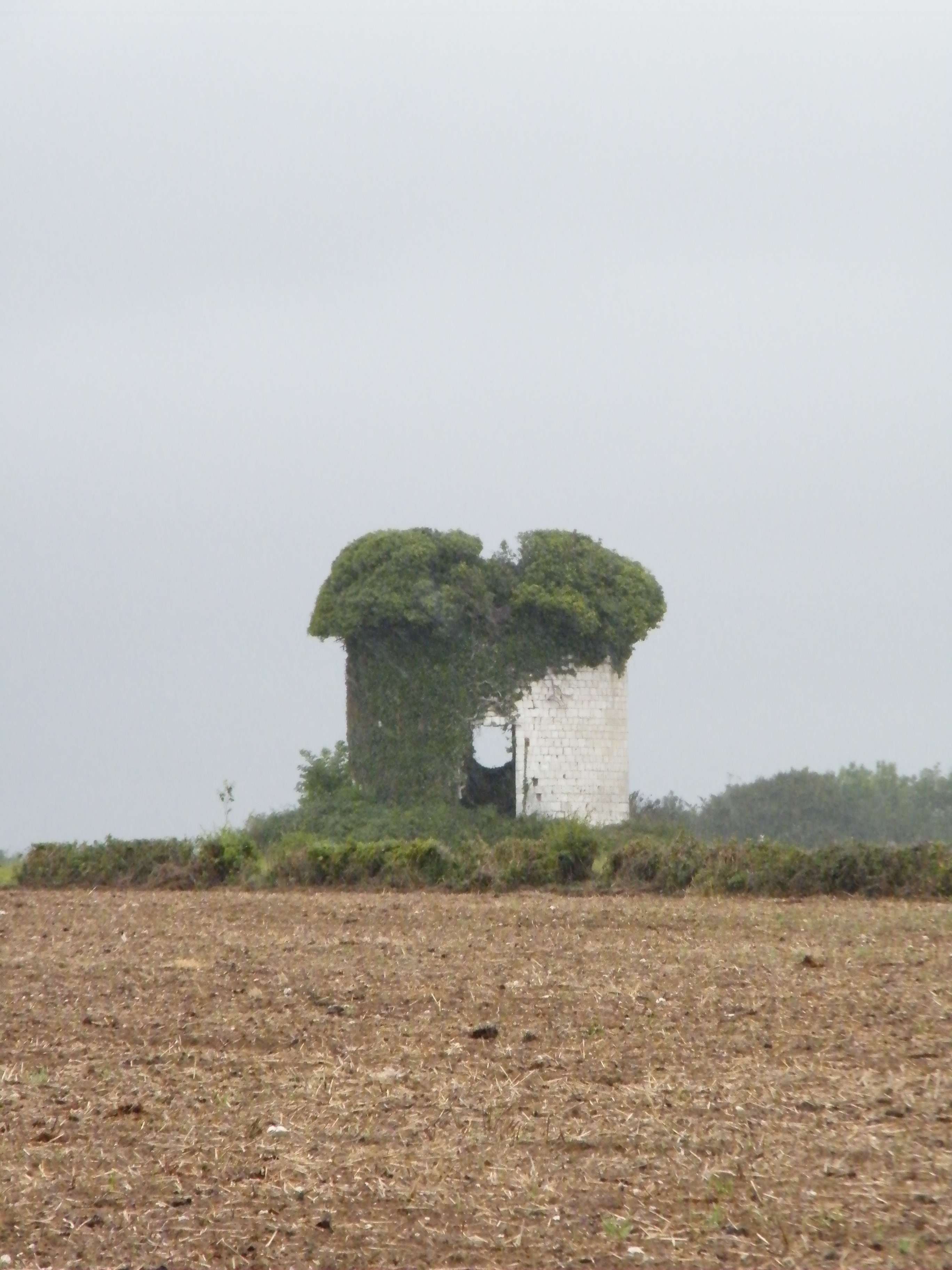 Dominois, Somme, Fr, ruines du moulin